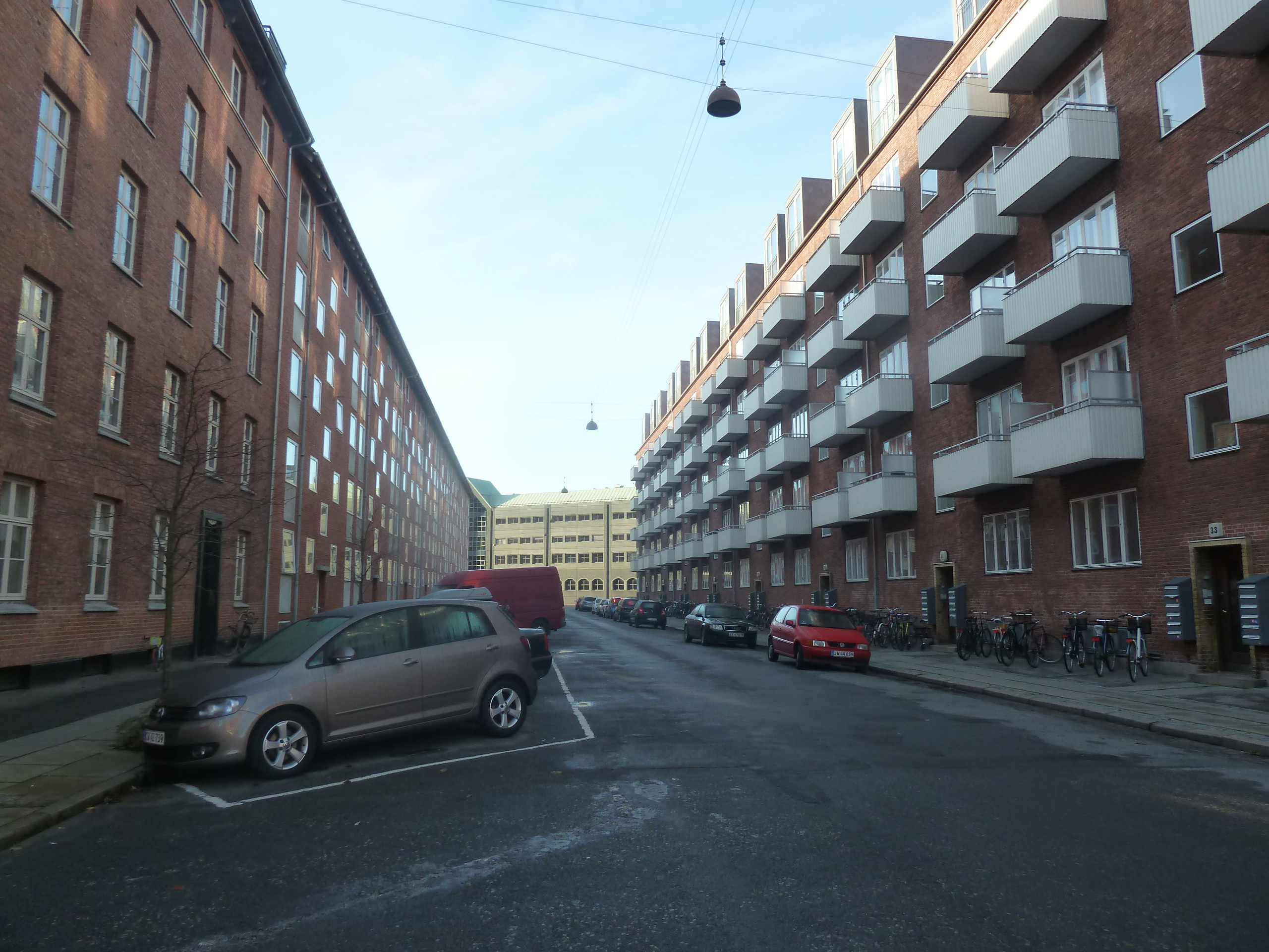 The street Ourøgade in Østerbro in Copenhagen.